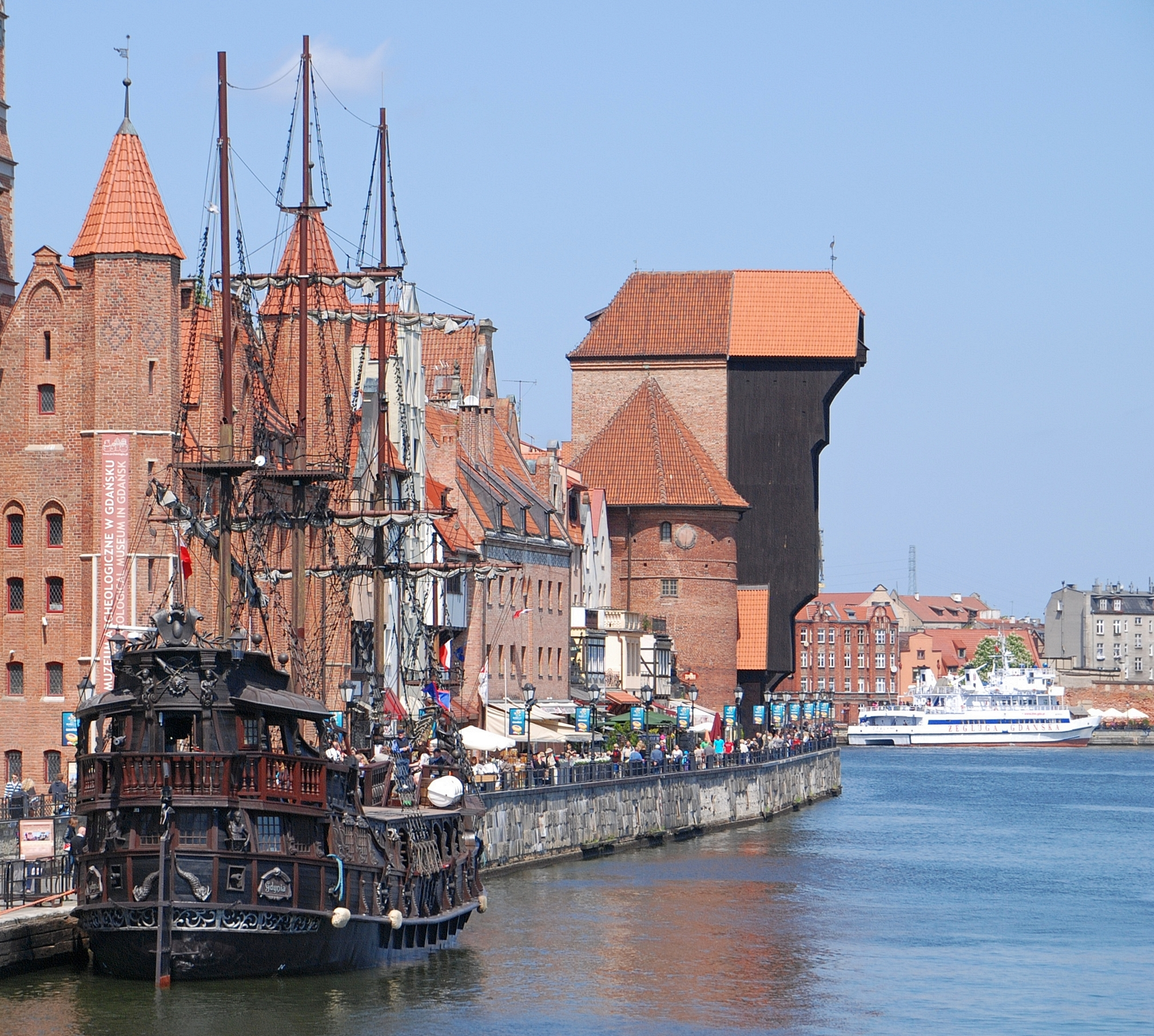 miasto Gdańsk